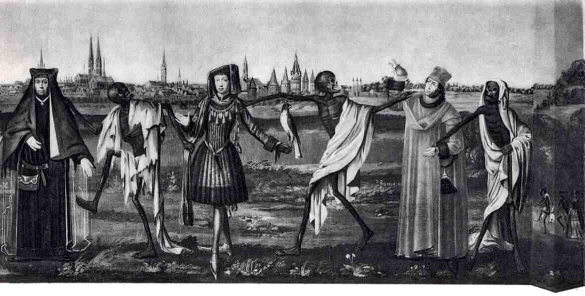 Totentanz Bild 5/9